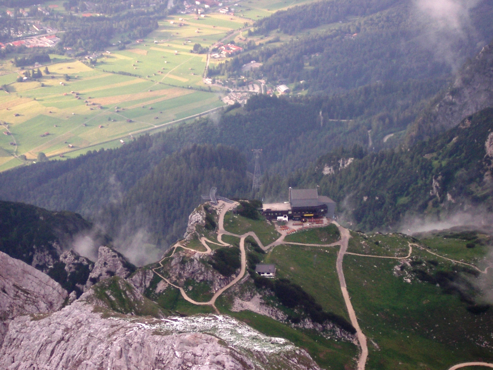 AlpspiX neben der Alpspitz-Bergstation fotografiert von der Alpspitz-Ferrata